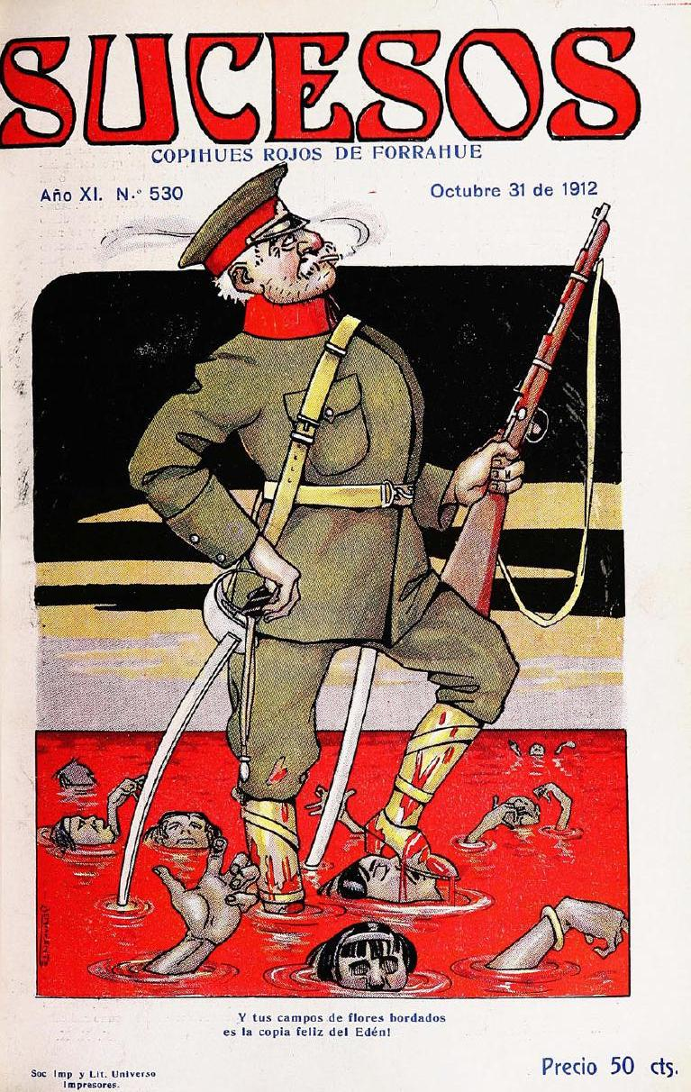 "Copihues rojos en Forrahue. Y tus campos de flores bordados es la copia feliz del Edén"